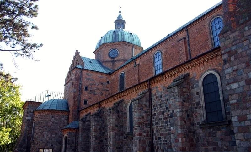 Polska